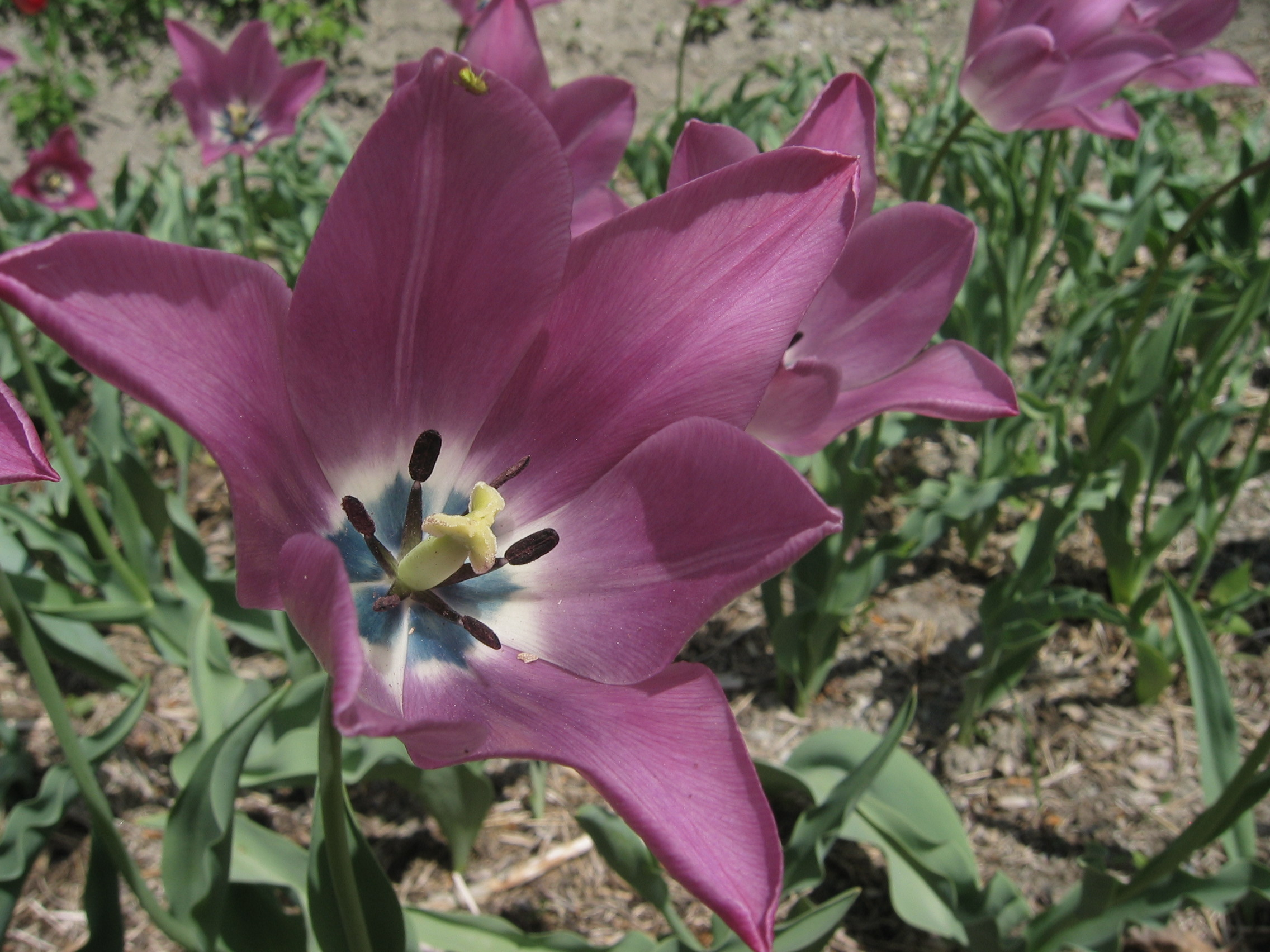 Une Tulipe de Guillestre (Tulipa gesneriana, syn. T. platystigma) dans la ville de Guillestre (Hautes-Alpes, France).